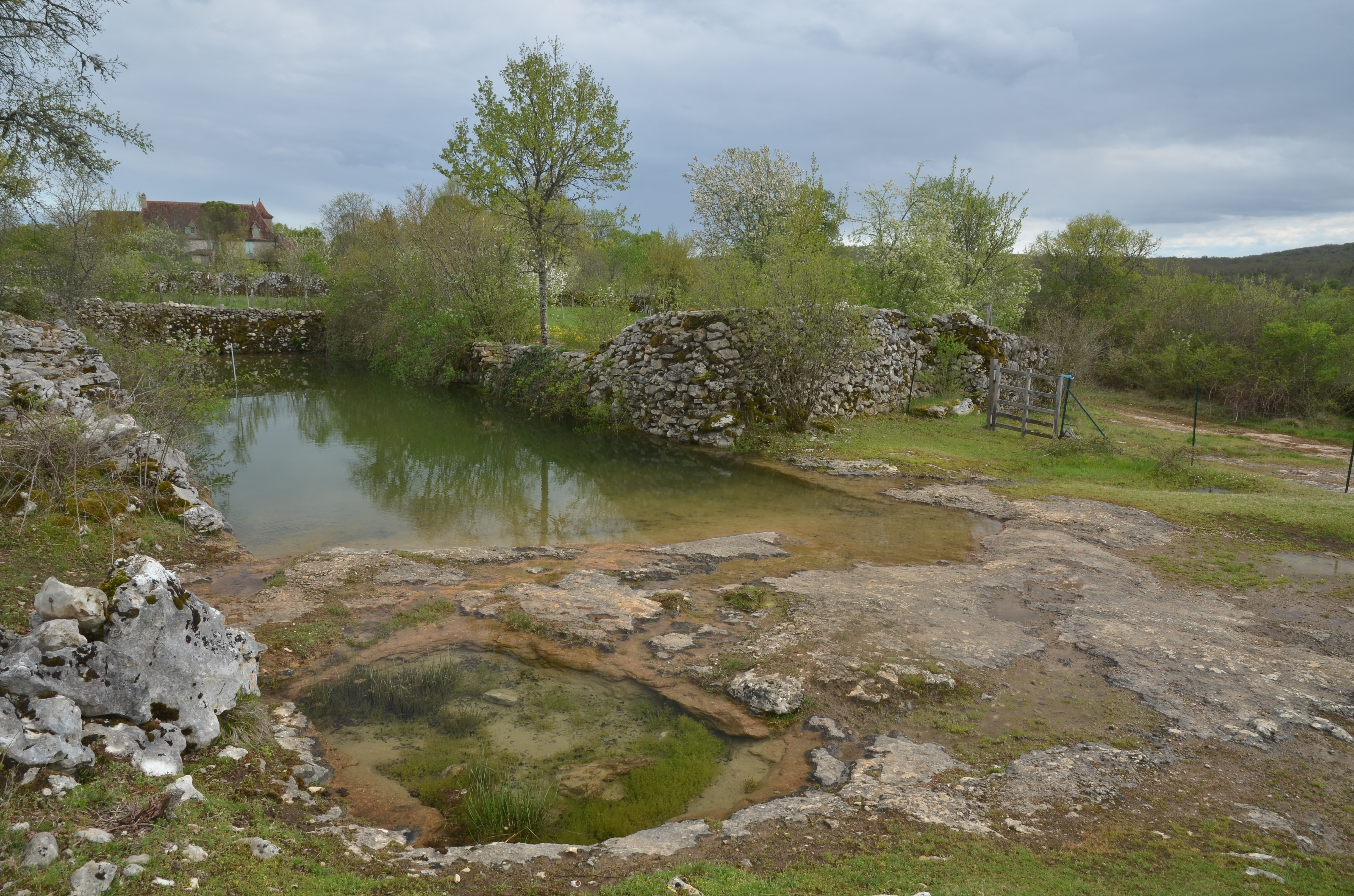 "Lac" attribué à Saint-Namphase (ou Saint Namphaise) à Clavel, Lot, France